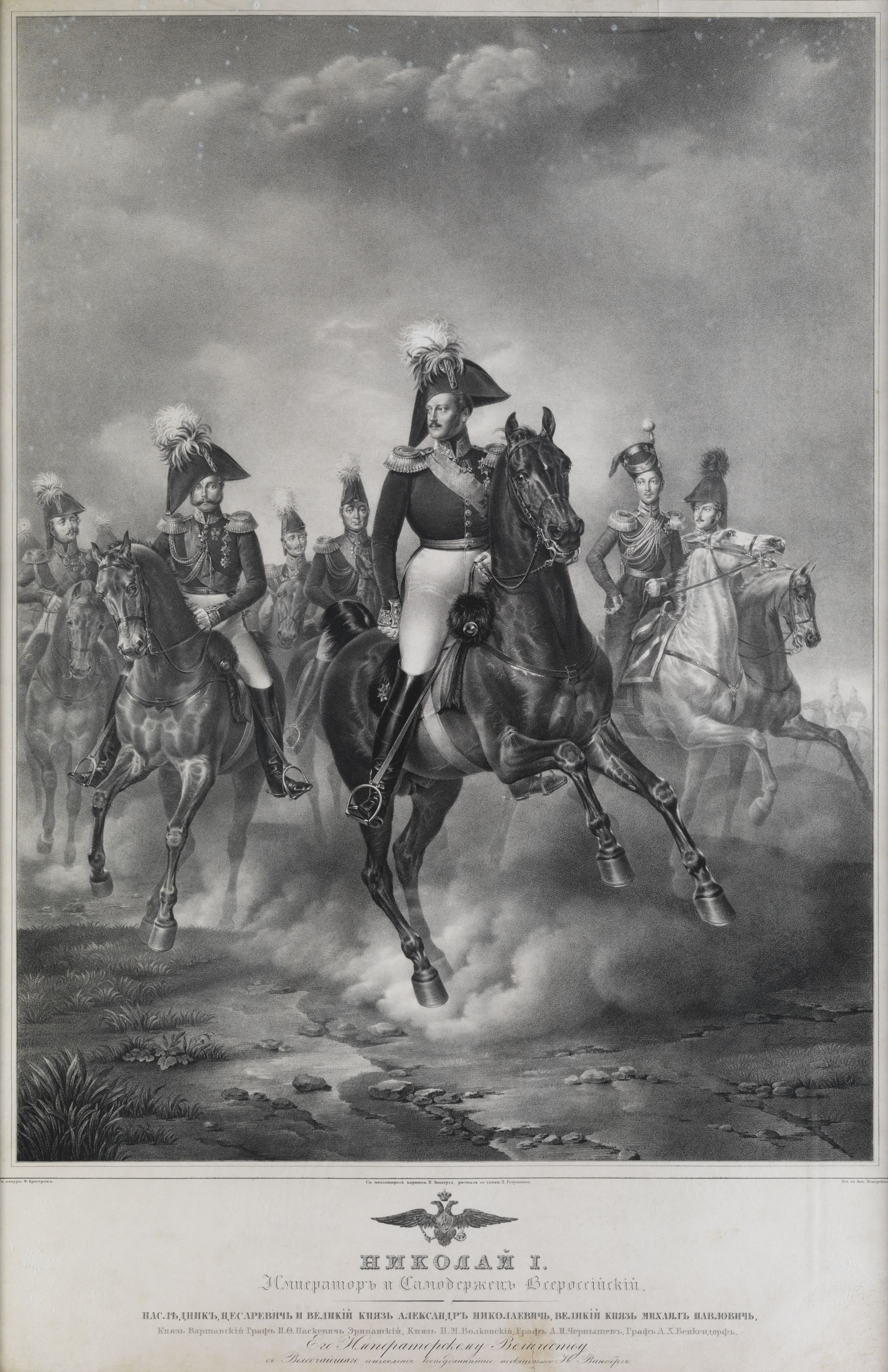 Zar Nikolaus I. zu Pferd mit Begleitern. Lithographie nach Franz Krüger. Legende russisch. Circa 87 x 54 cm.